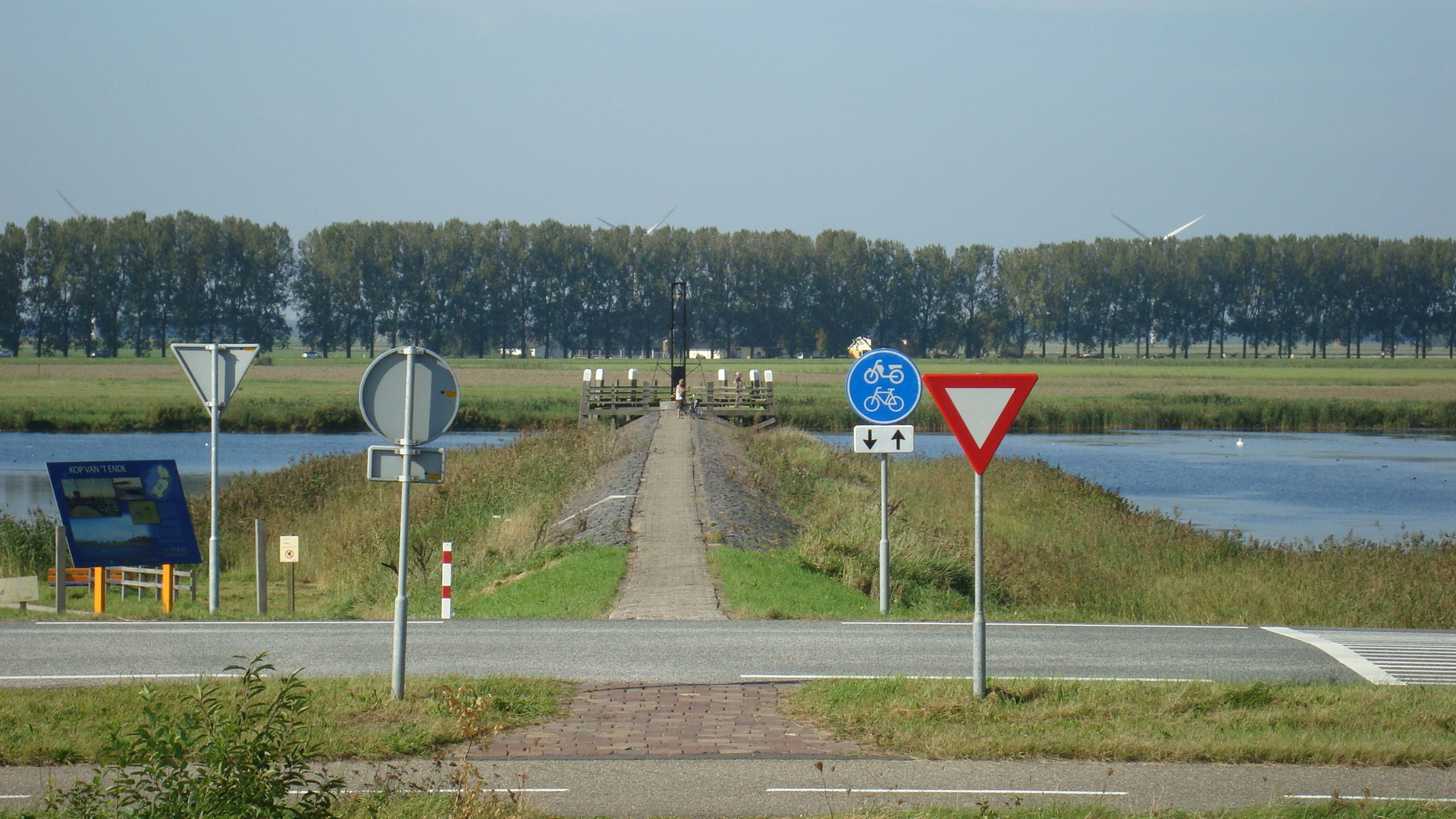 Foto genomen vanaf de Drontermeerdijk, staand op de grens tussen het oude en het nieuwe land. Deze foto geeft een mooi beeld van de huidige situatie.